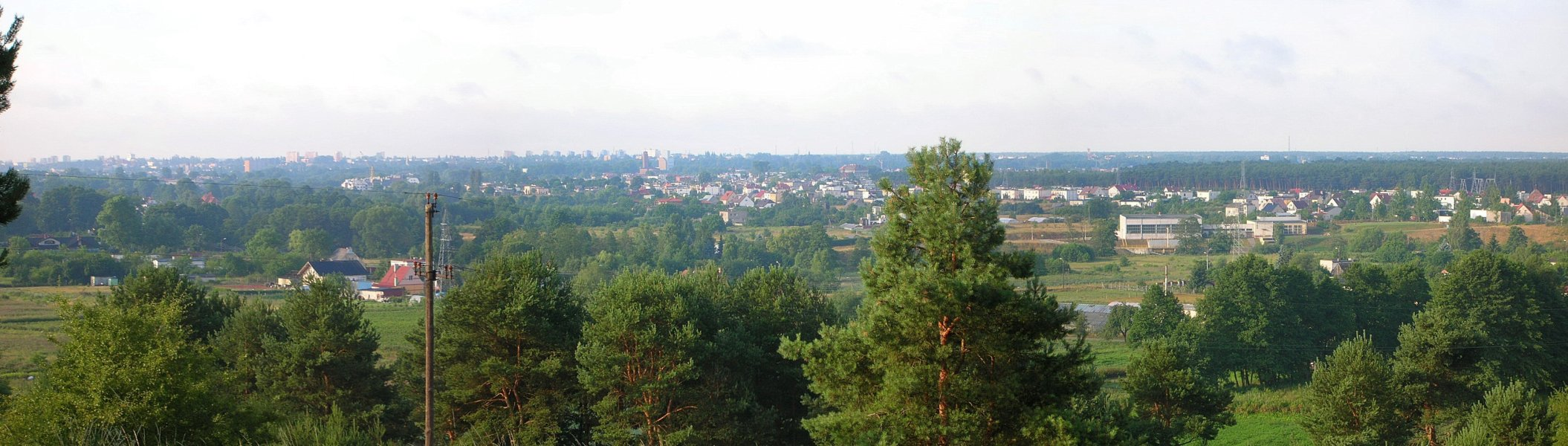 Widok ze zbocza doliny Brdy na Piaskach w Bydgoszczy